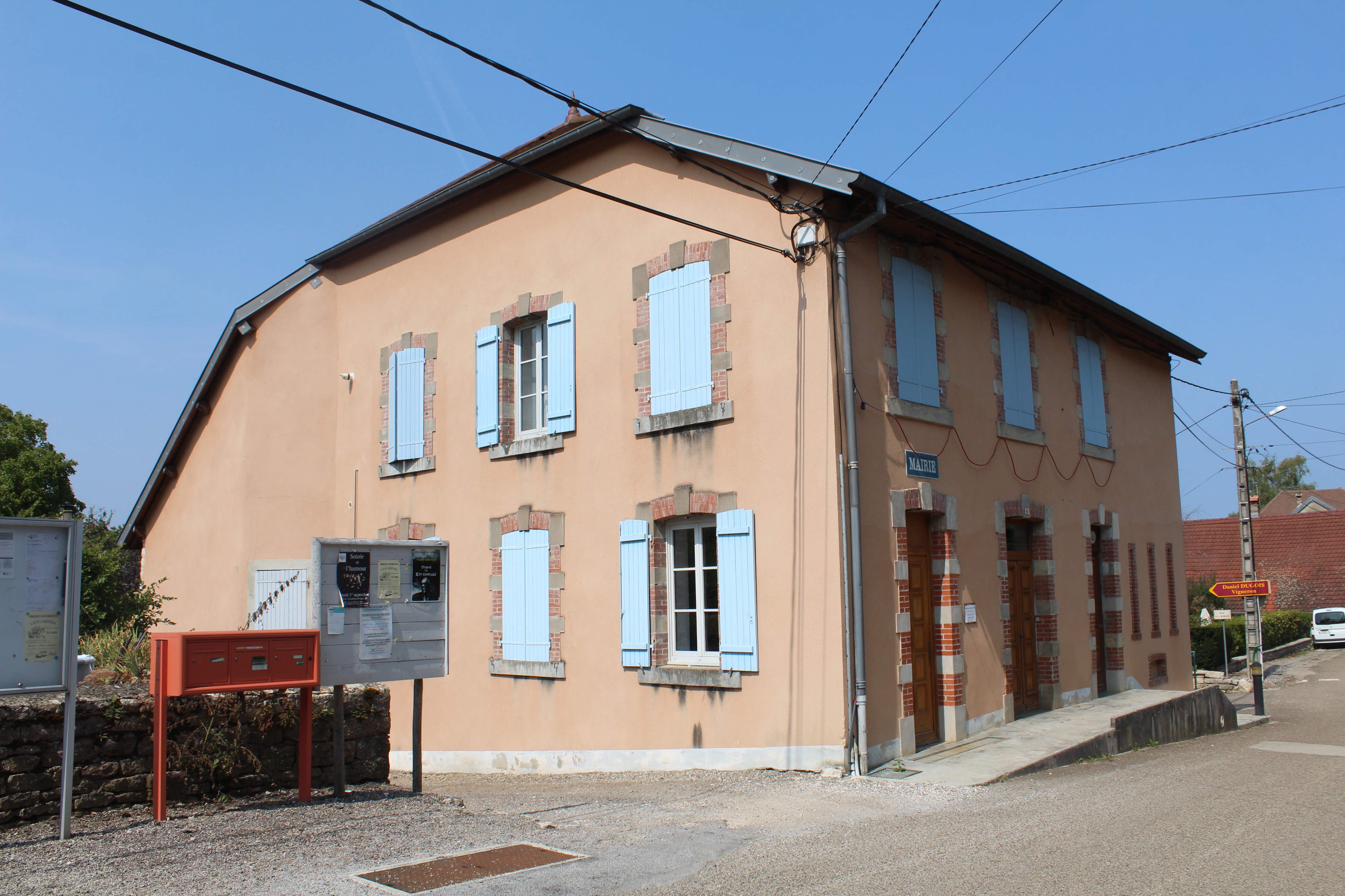 Mairie des Arsures.